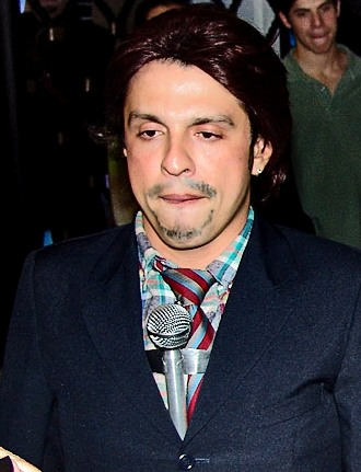 Wellington Muniz é um humorista brasileiro.